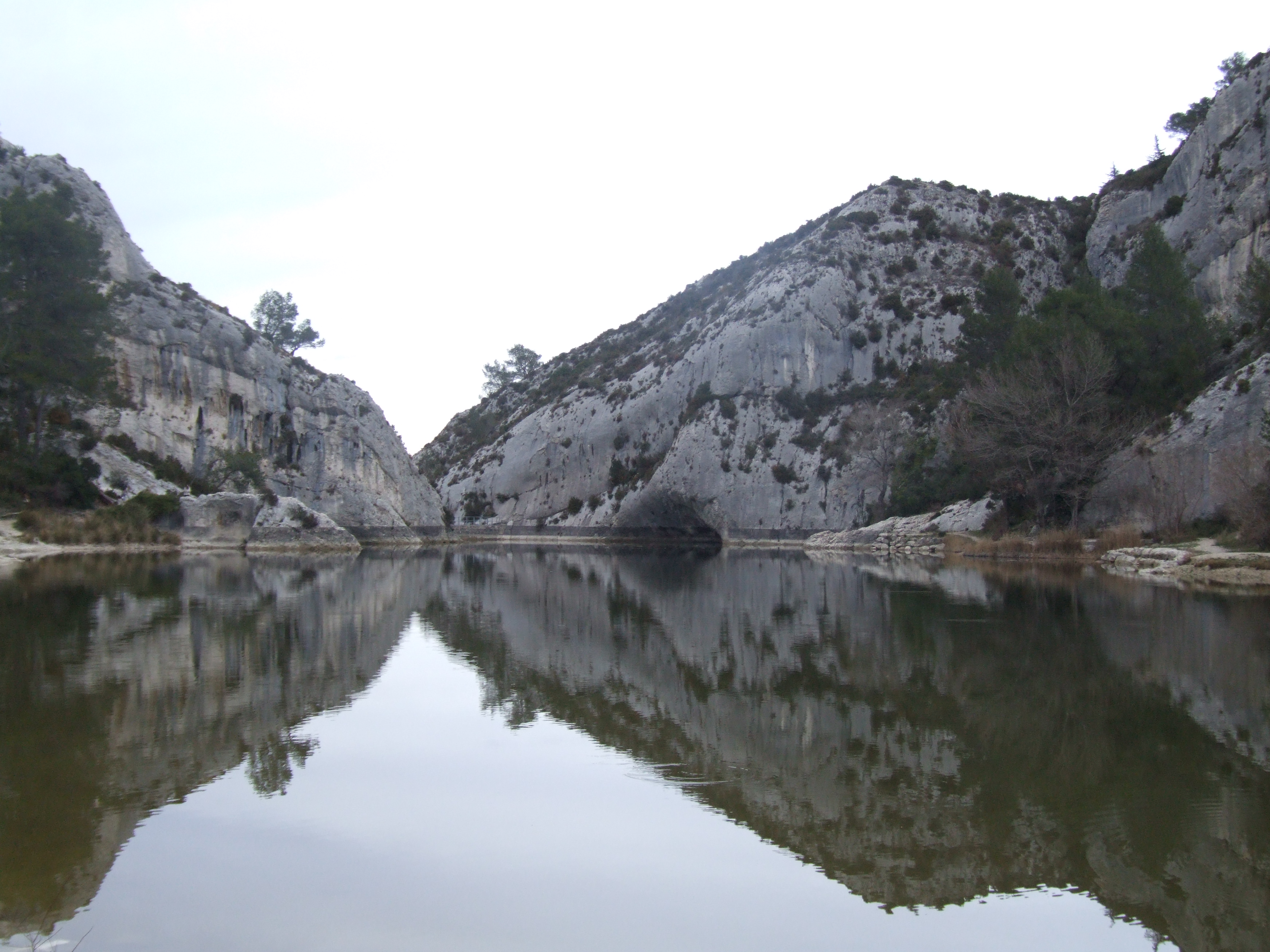 vue du lac de Peirou à proximité de Saint-Rémy-de-Provence